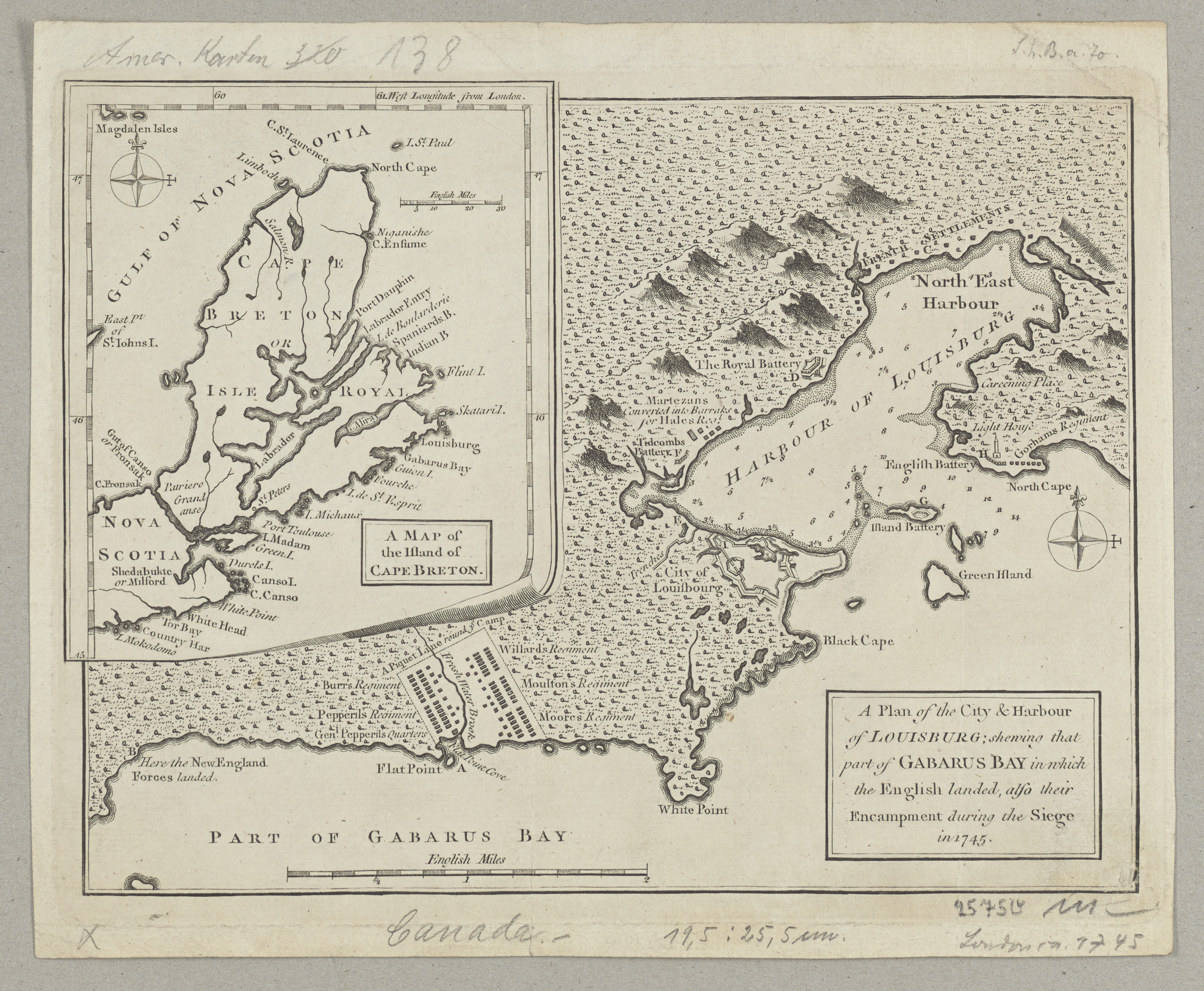 1 Kt. : unkolor. (25 x 19 cm); Koordinaten W 62°02'00"-W 59°26'00"/N 47°23'00"-N 44°56'00"; Maßstab in graph. Form (English Miles). - Titelkartusche unten rechts. - Mit 1 Nebenkt.: A Map of the Island of Cape Breton. - Relief angedeutet